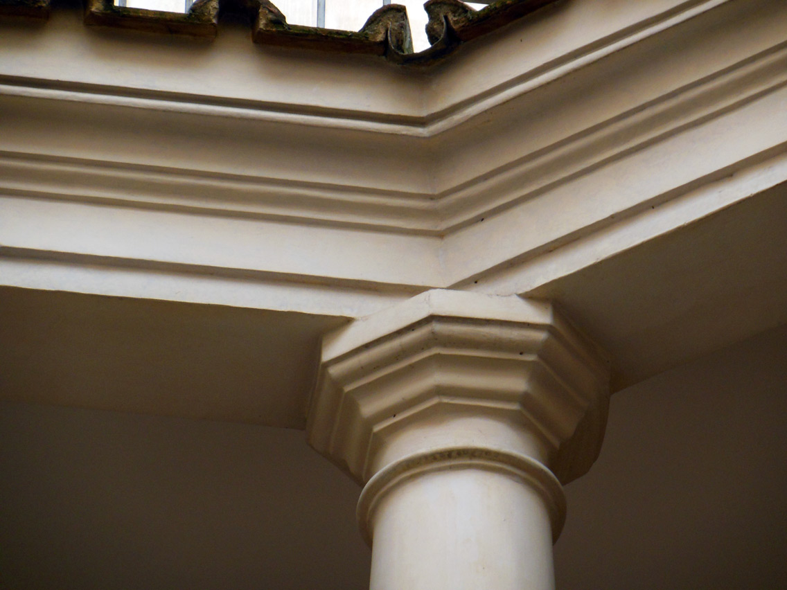 Roma, San Carlo alle Quattro Fontane, chiostro, particolare di capirello e trabeazione del secondo ordine